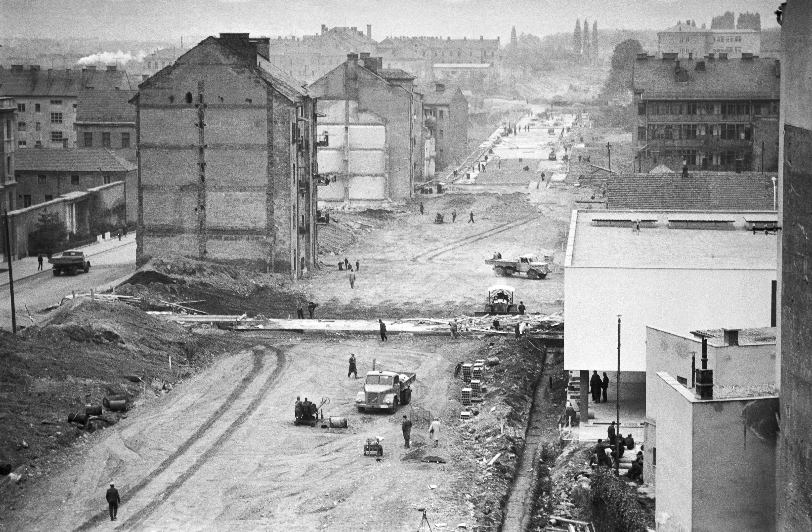 Gradnja Titove ceste v Mariboru